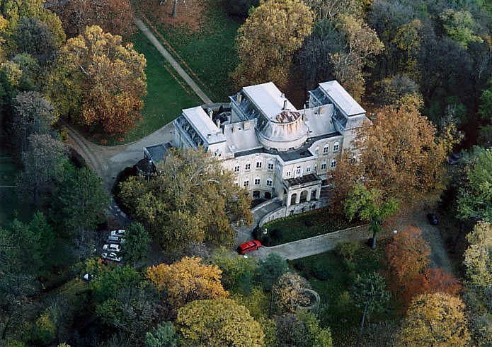 Palace - Tóalmás - Hungary - Europe